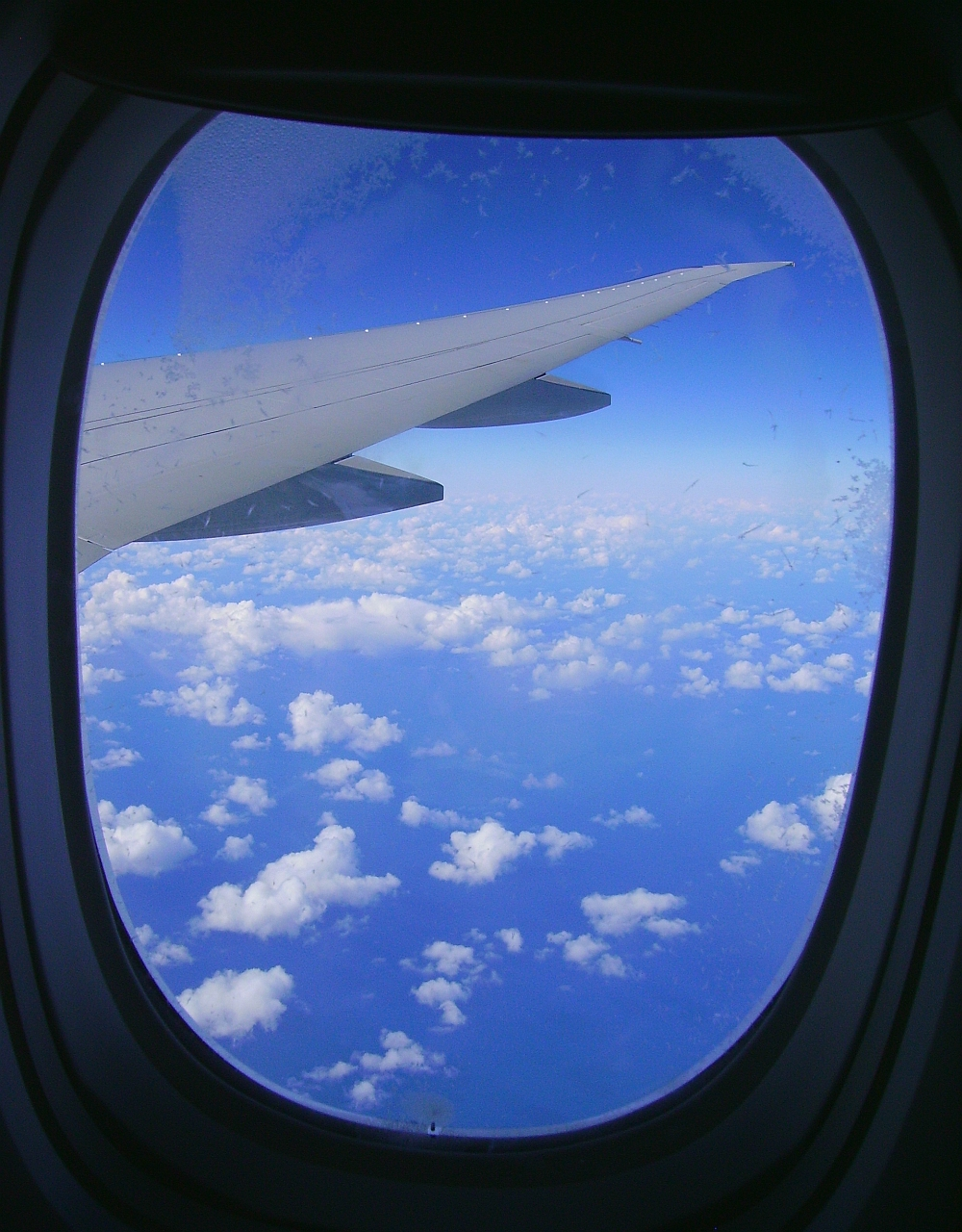 Vue depuis un hublot d'un Boeing 777-300ER de Air France en vol au dessus de l'Atlantique le 01/03/2010.